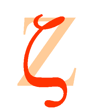 Greek letter